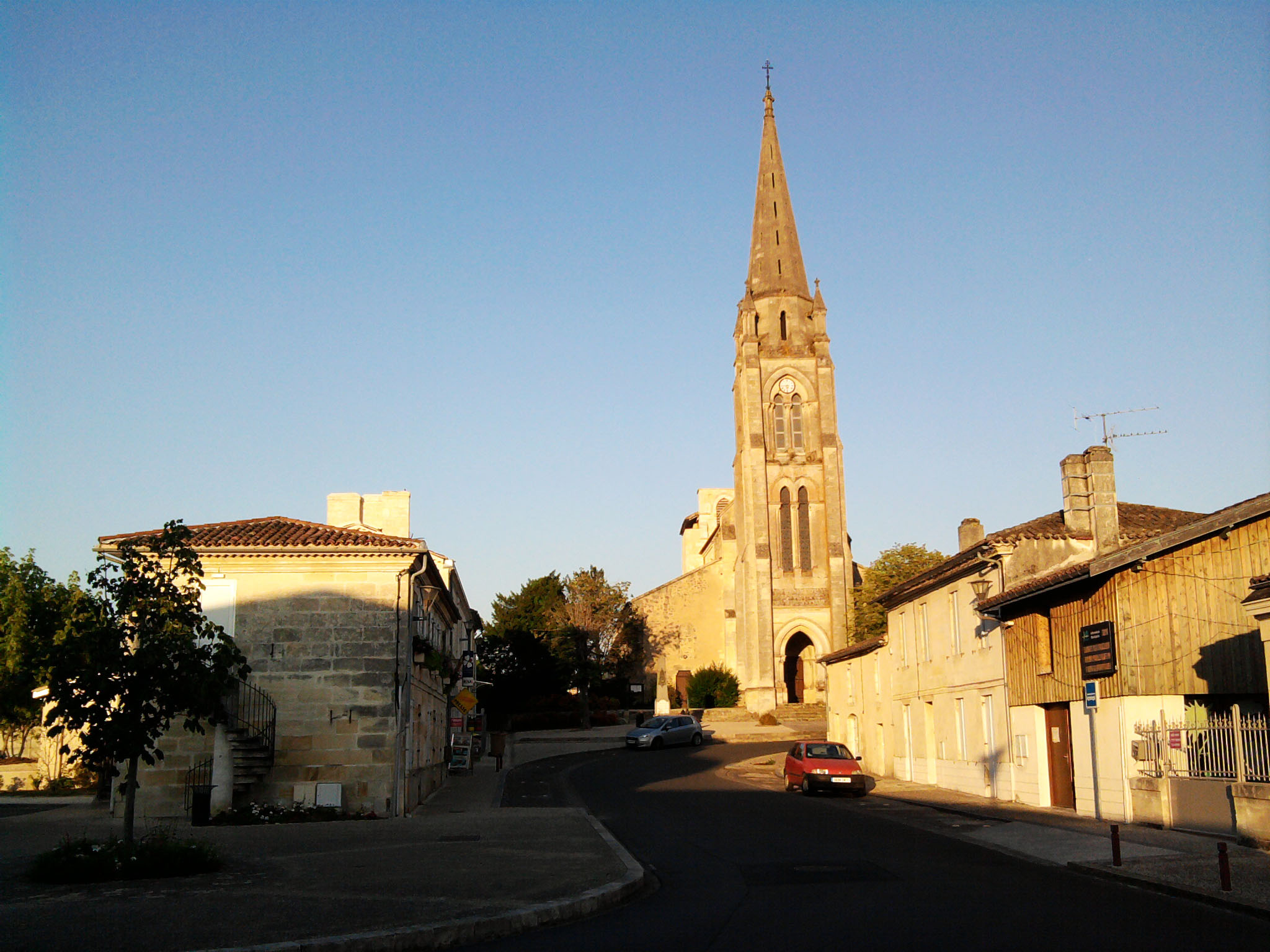 Photo du bourg de Tresses en Gironde et de son église Saint Pierre